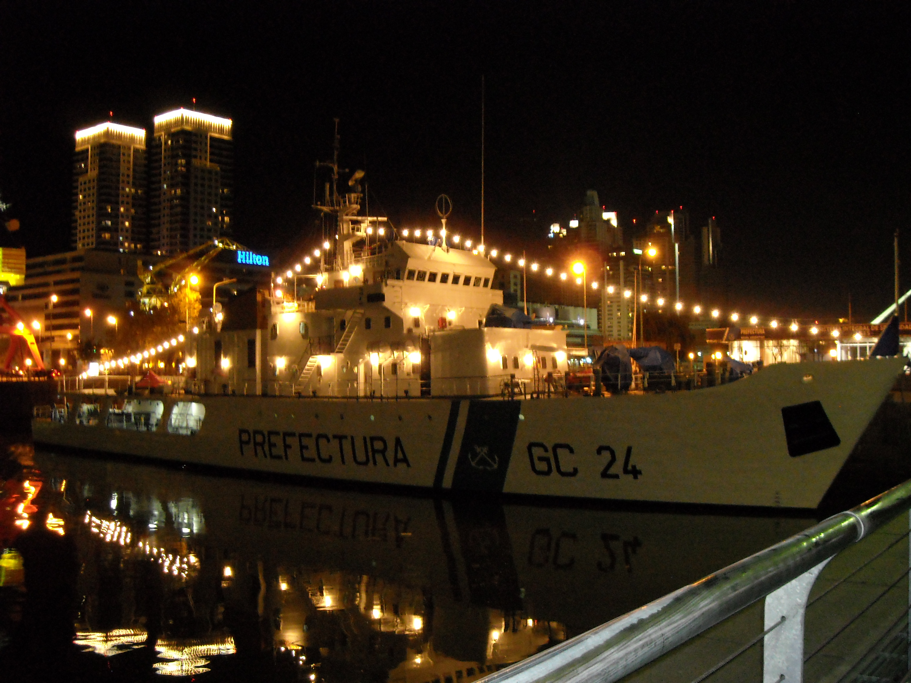 Guardacostas GC-24 “Mantilla” anclado en Puerto Madero, Buenos Aires, Argentina.